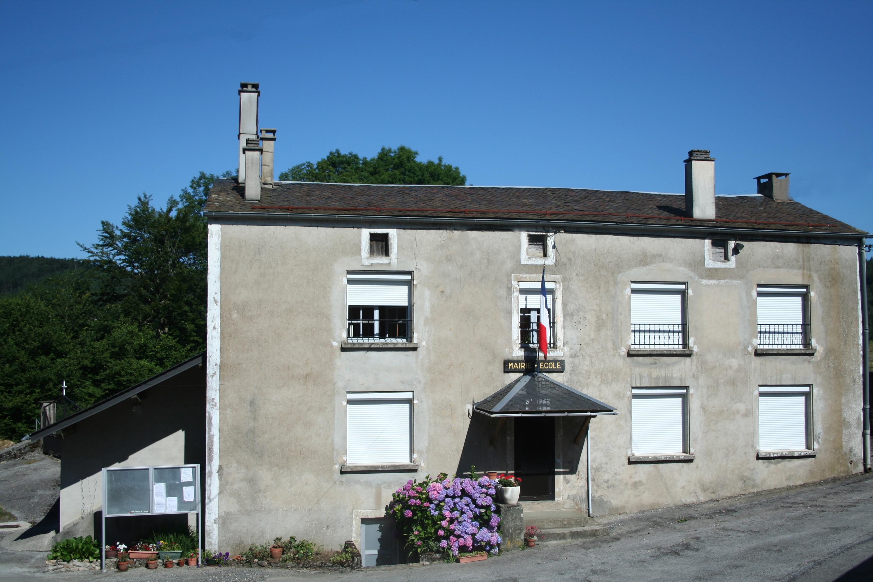 Le Margnès (Tarn) - mairie.